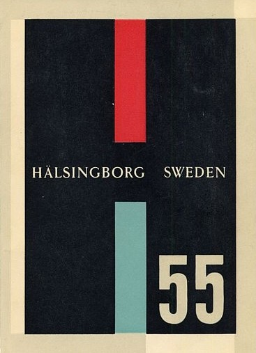 Helsingborgsutställningen H55, utställningskatalog